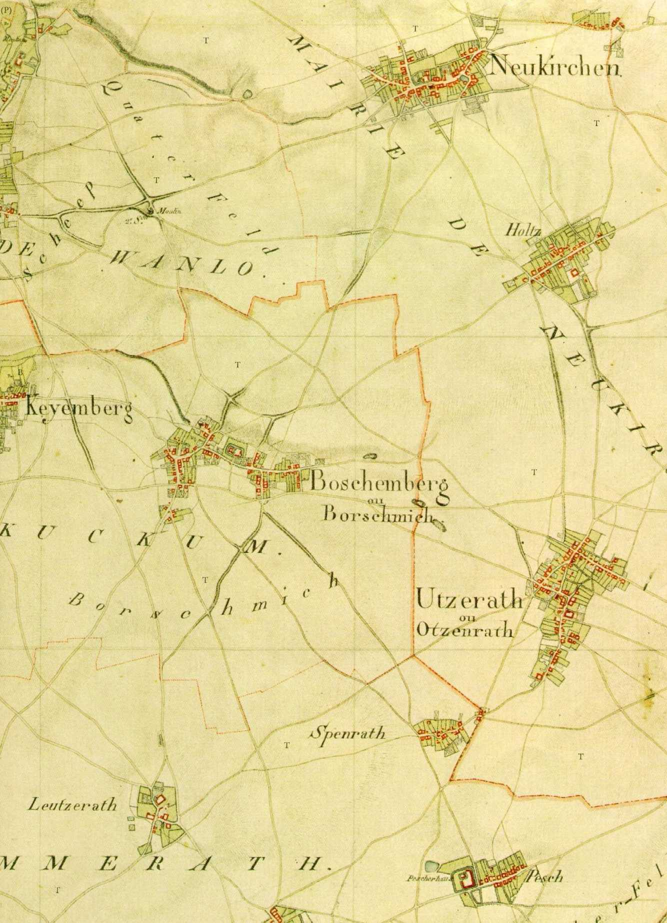 Map of Borschemich Otzenrath Spenrath Holz (Erkelenz, Jüchen, Germany); Kartenaufnahme des Rheinlands von Tranchot/Müffling, (Aufnahme von 1806/07)